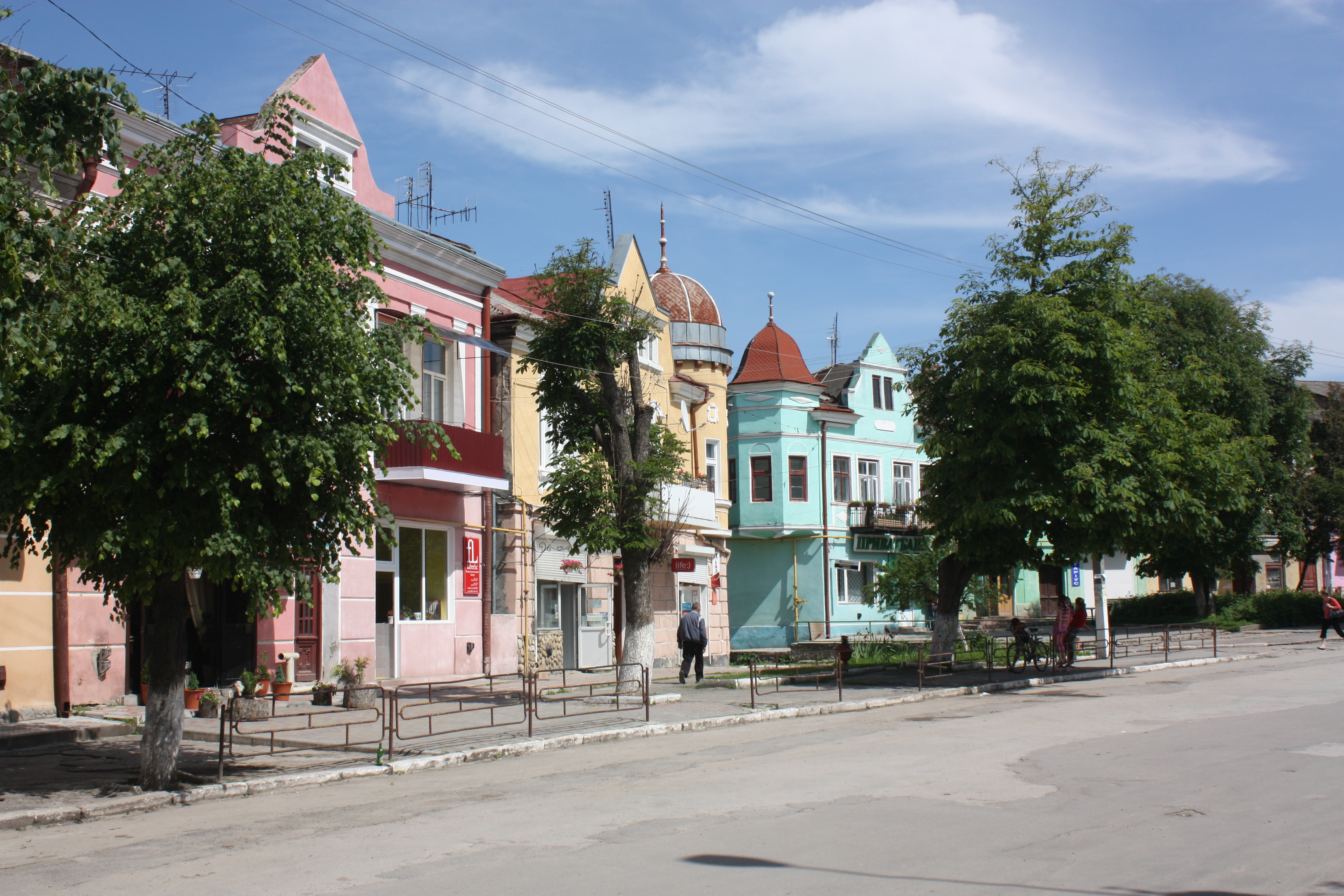 Kamienice na rynku w Podhajcach 2010